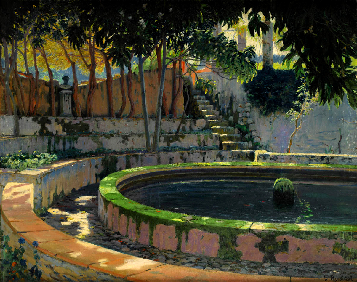 Jardín de las Elegías. Son Moragueslabel QS:Les,"Jardín de las Elegías. Son Moragues"